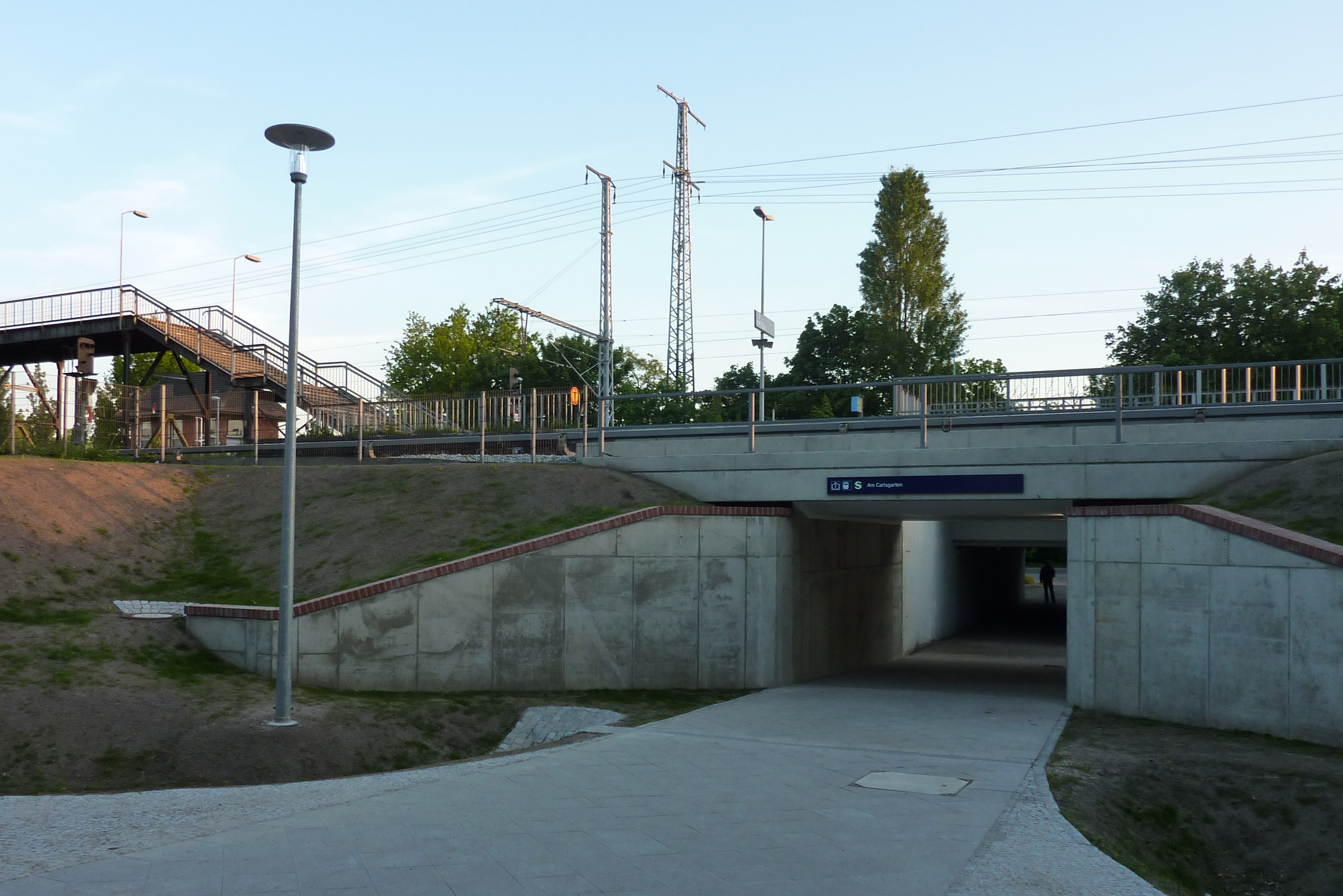 Neue Bahnbrücke an der Stolzenfelsstraße in Berlin-Karlshorst – Durchgang nach Am Carlsgarten mit Zugang zum S-Bahnhof Karlshorst.